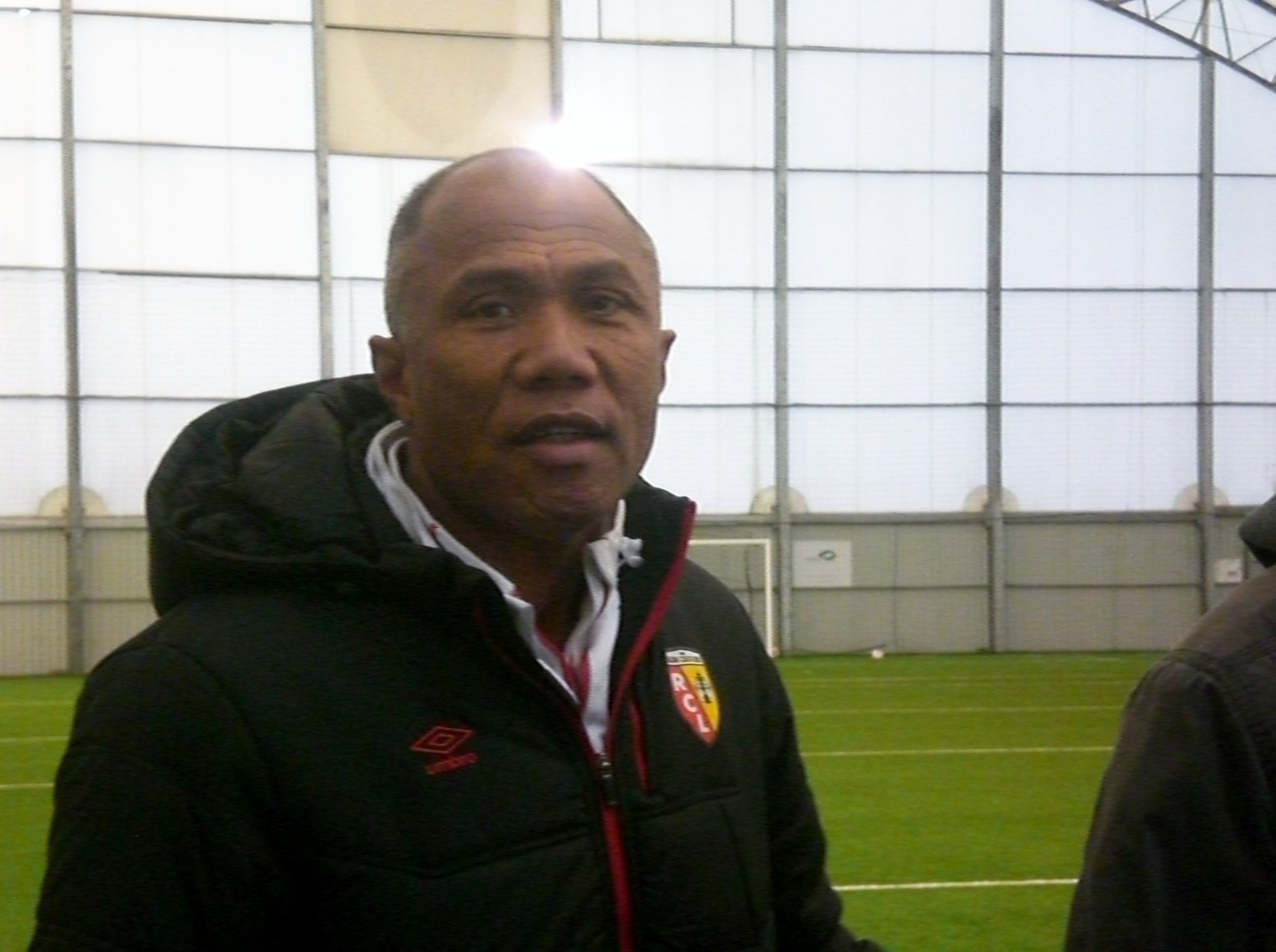 Antoine Kombouaré après un entraînement public du Racing Club de Lens, le 13 janvier 2016, sous le Dôme du Complexe Sportif de La Gaillette, à Avion.